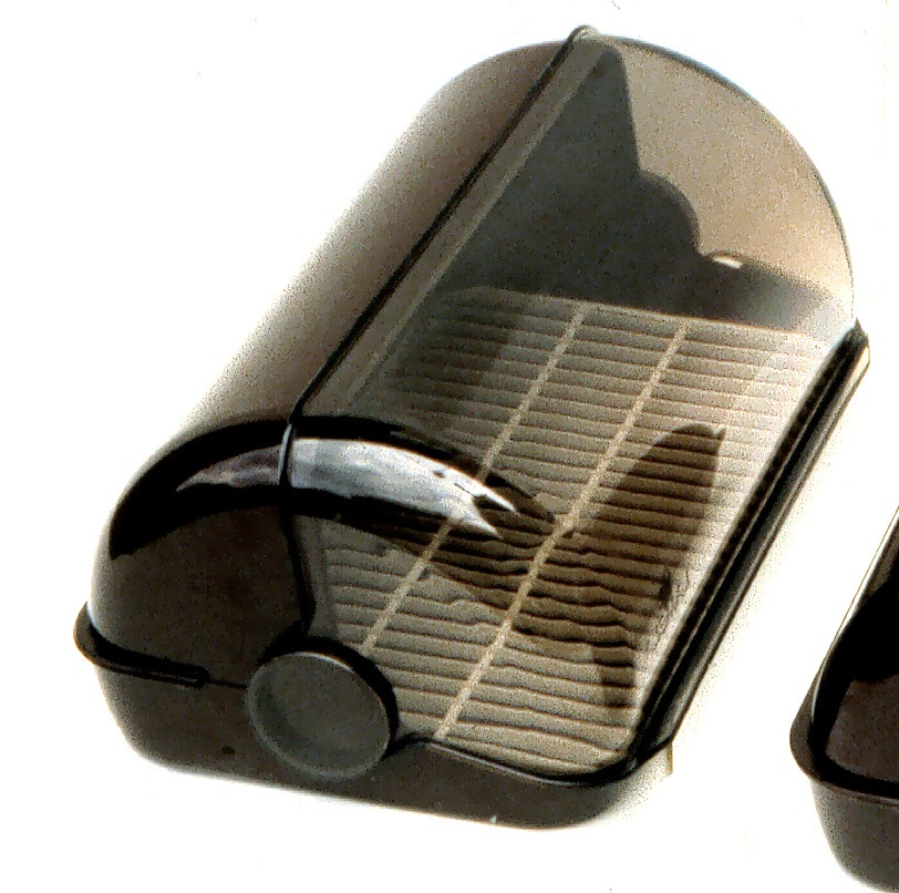 Pojemnik na chleb firmy Lamela Łowicz